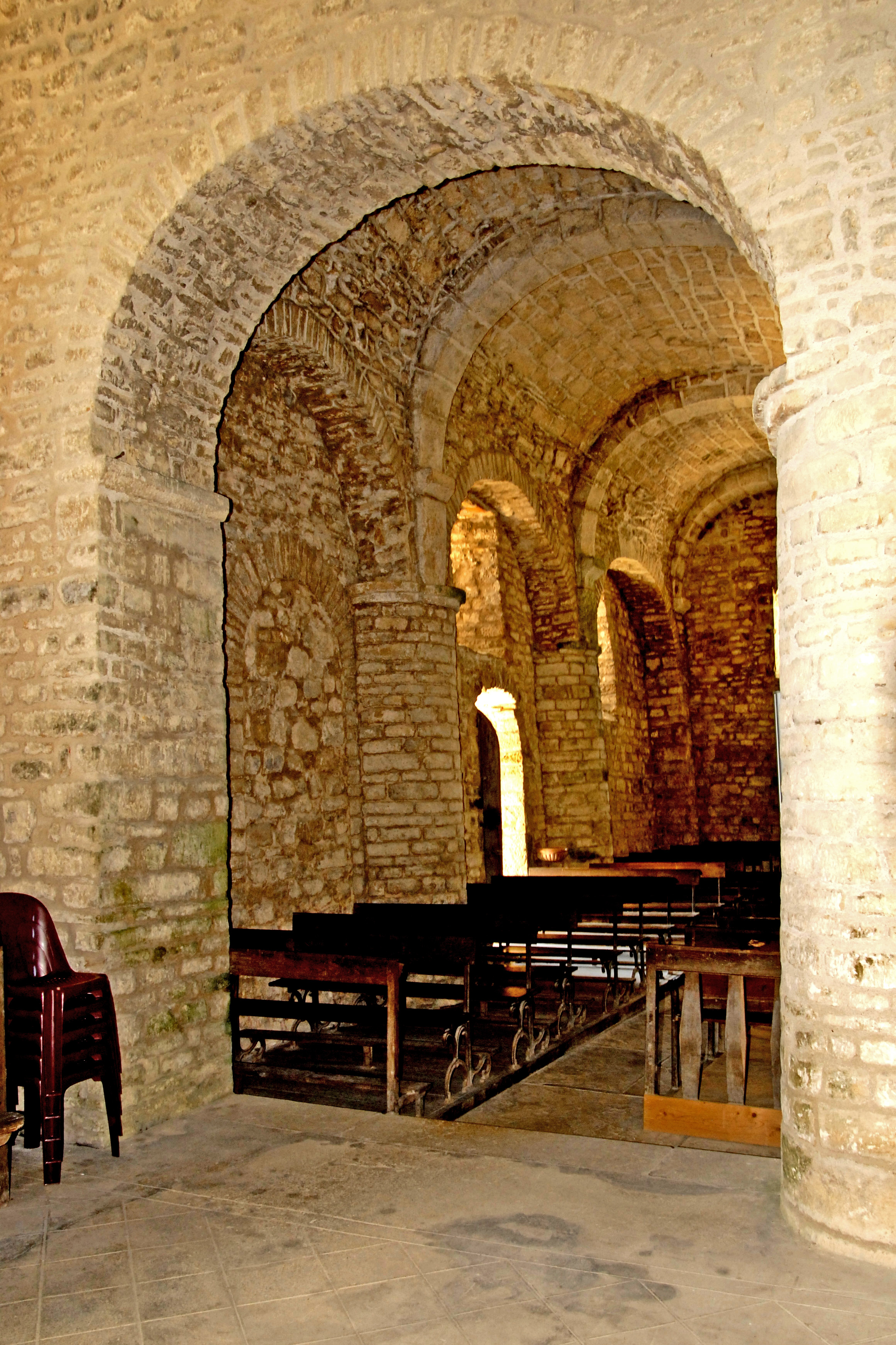 Saint-Hymetière, südliches Seitenschiff, aus dem Querhaus